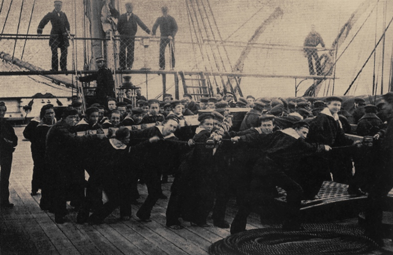 Matrosen auf der Korvette SMS "Arcona" (1858)